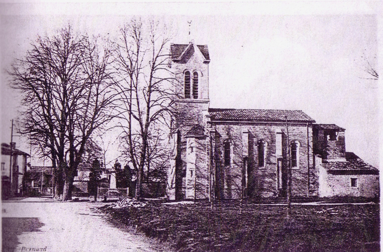 L'église de Thil, dans le département de l'Ain, photographiée en 1900.